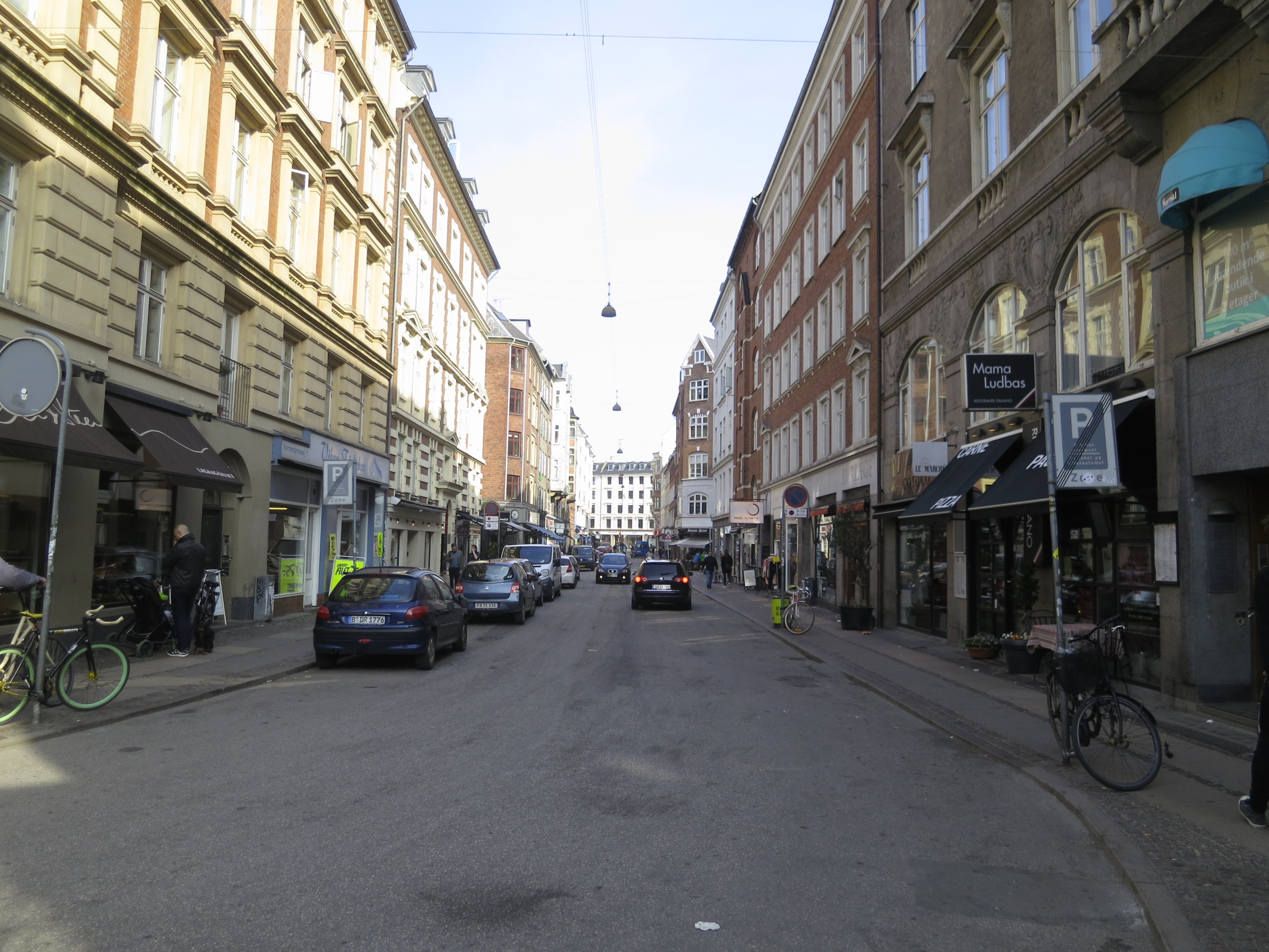 Værnedamsvej in Copenhagen, Denmark